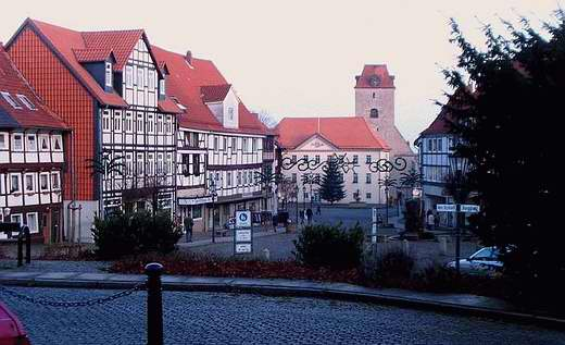 Zum Artikel selbst angefertigt Juergen Bode 15:05, 14. Jul 2004 (CEST)